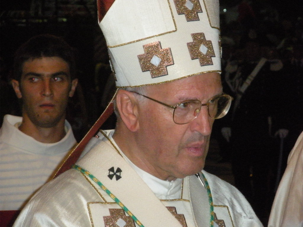 Arcivescovo di L'Aquila